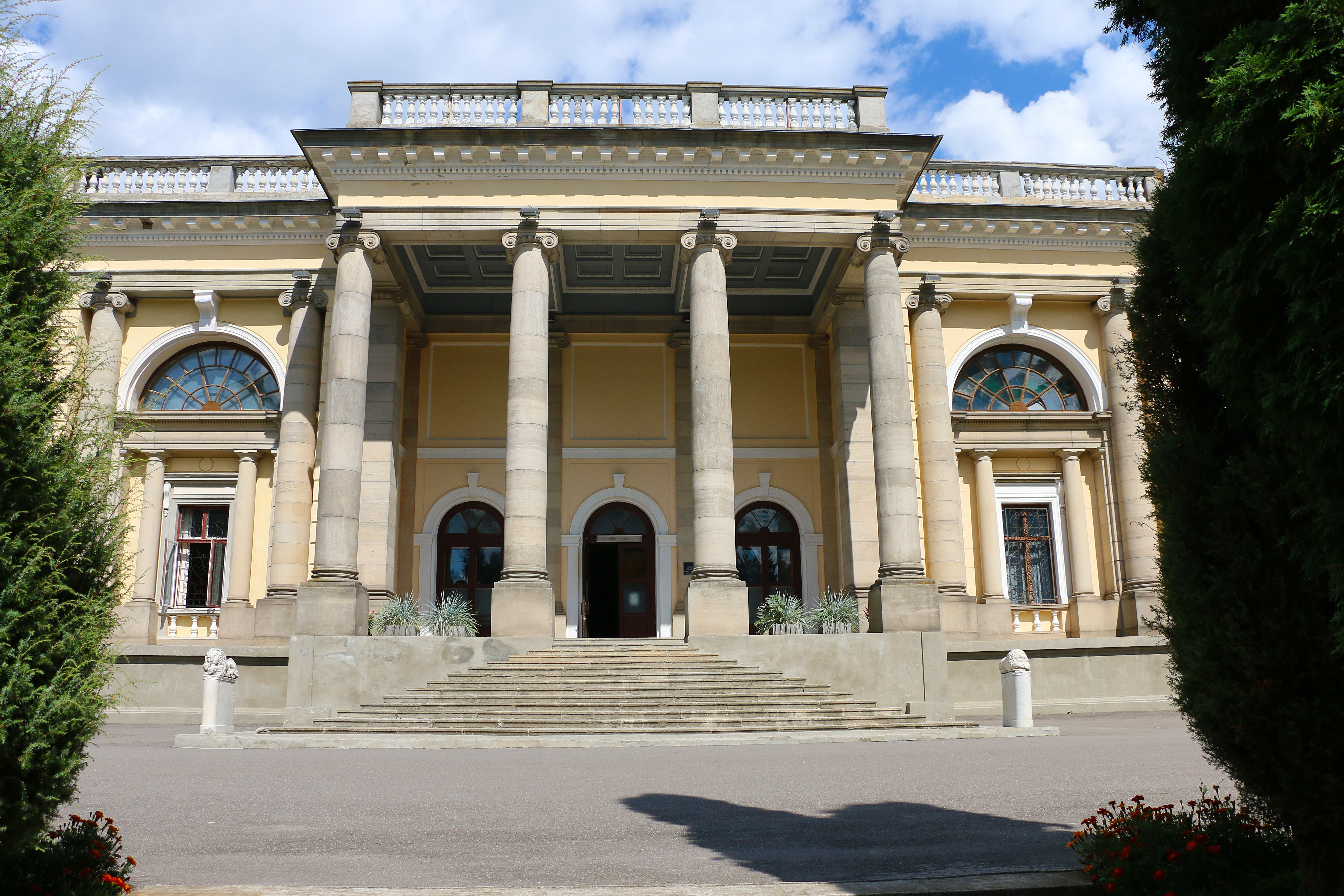 Палац княгині М. Щербатової, Немирів, вул. Шевченка, 16